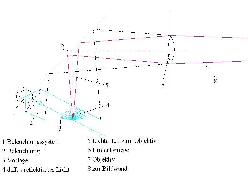 Episkop, Schematischer Strahlengang mit Beleuchtung der Vorlage, bis zur Projektion durch das Objektiv auf die Bildwand